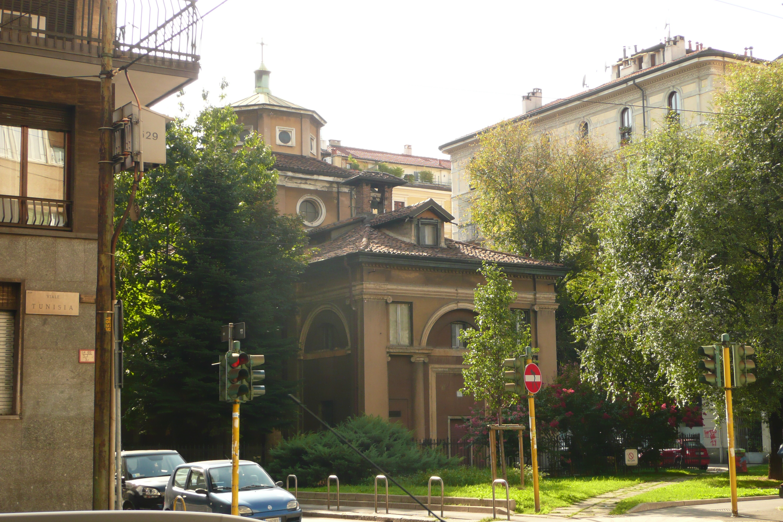 abside